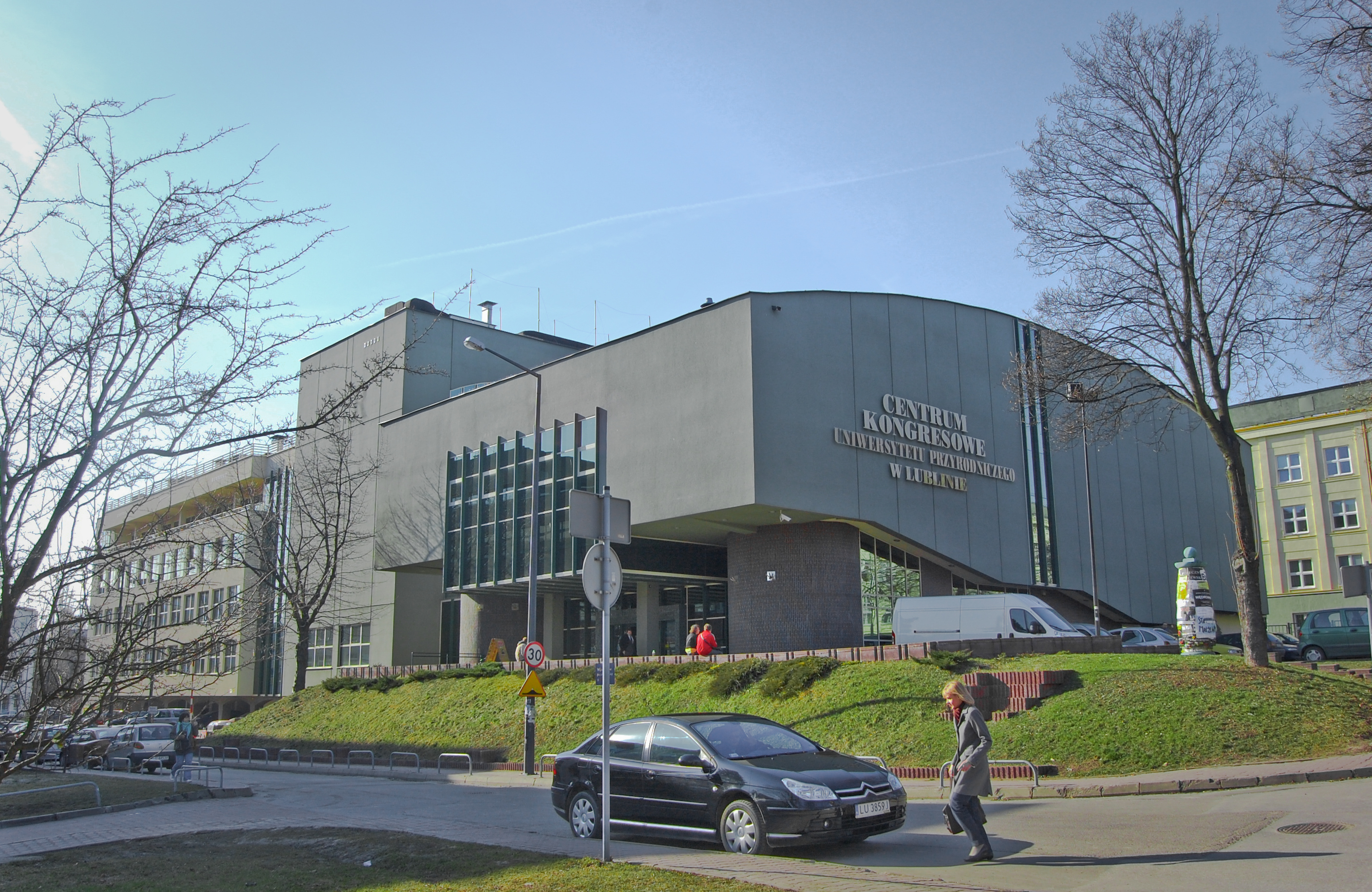 Centrum Kongresowe Uniwersytetu Przyrodniczego w Lublinie.